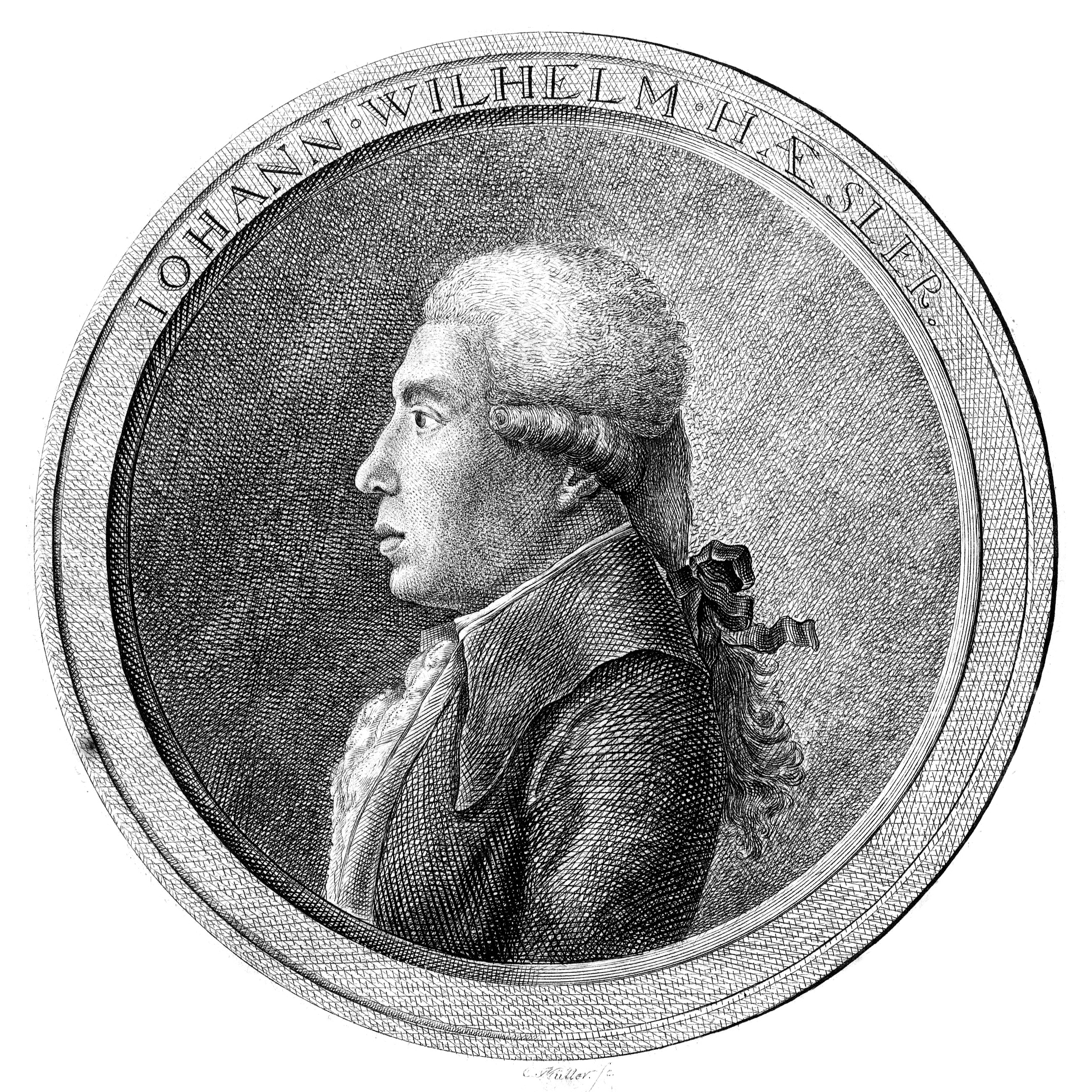 Johann Wilhelm Häßler by Christian Müller